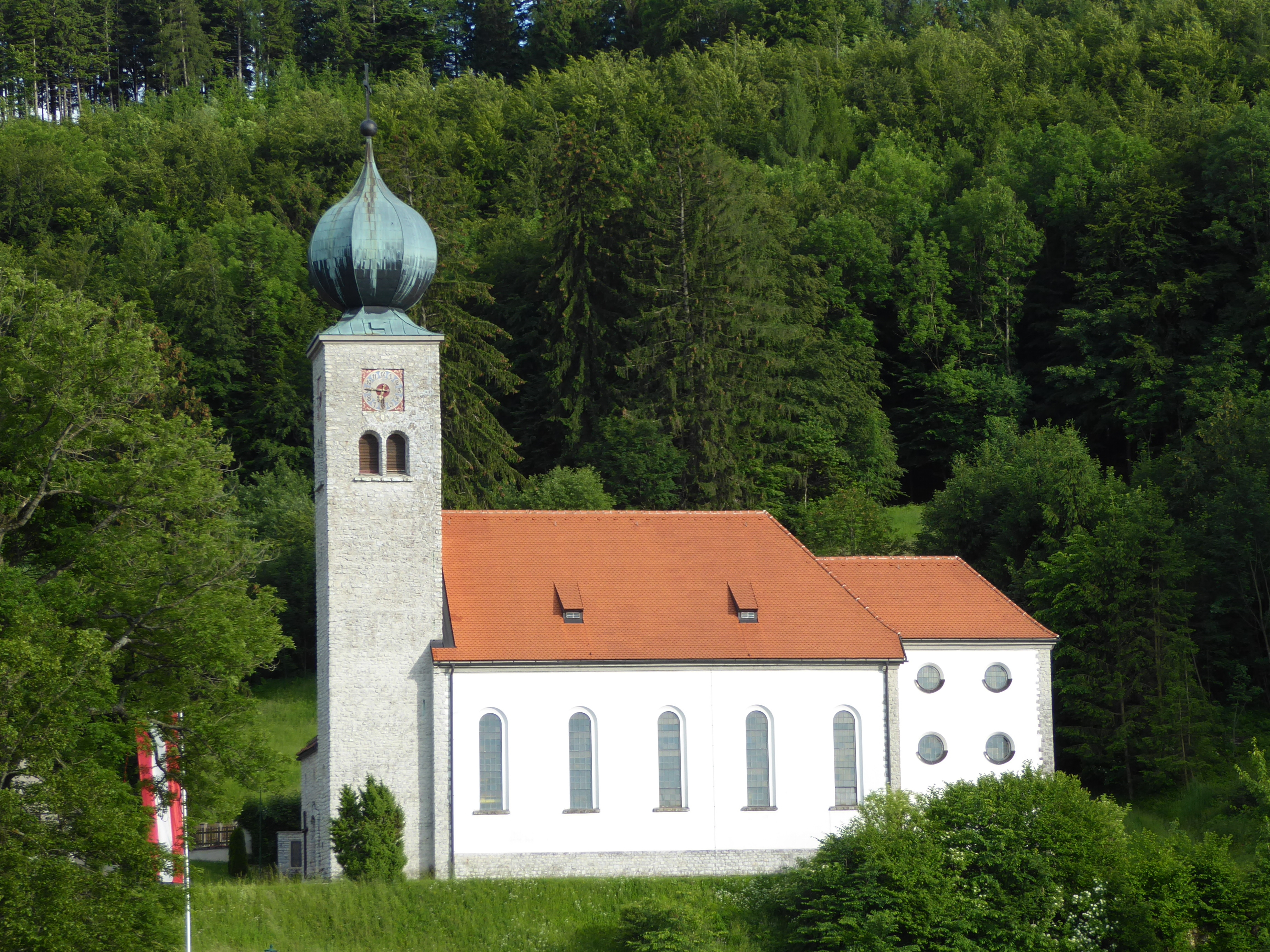 Pfarr- und Wallfahrtskirche Maria Schnee, Plankenstein 15a, Texingtal, Niederösterreich